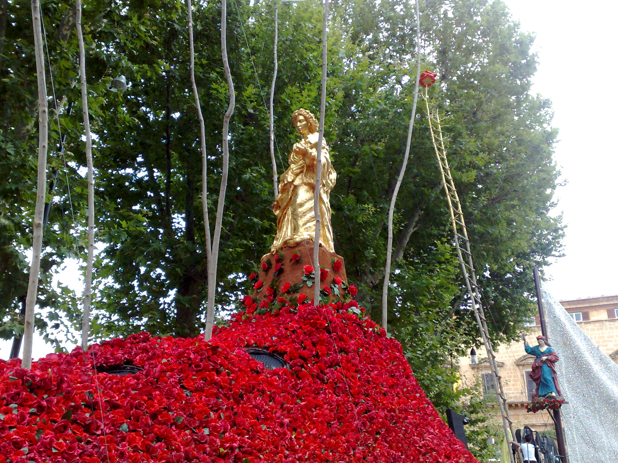 Festino di Santa Rosalia a Palermo, carro delle rose